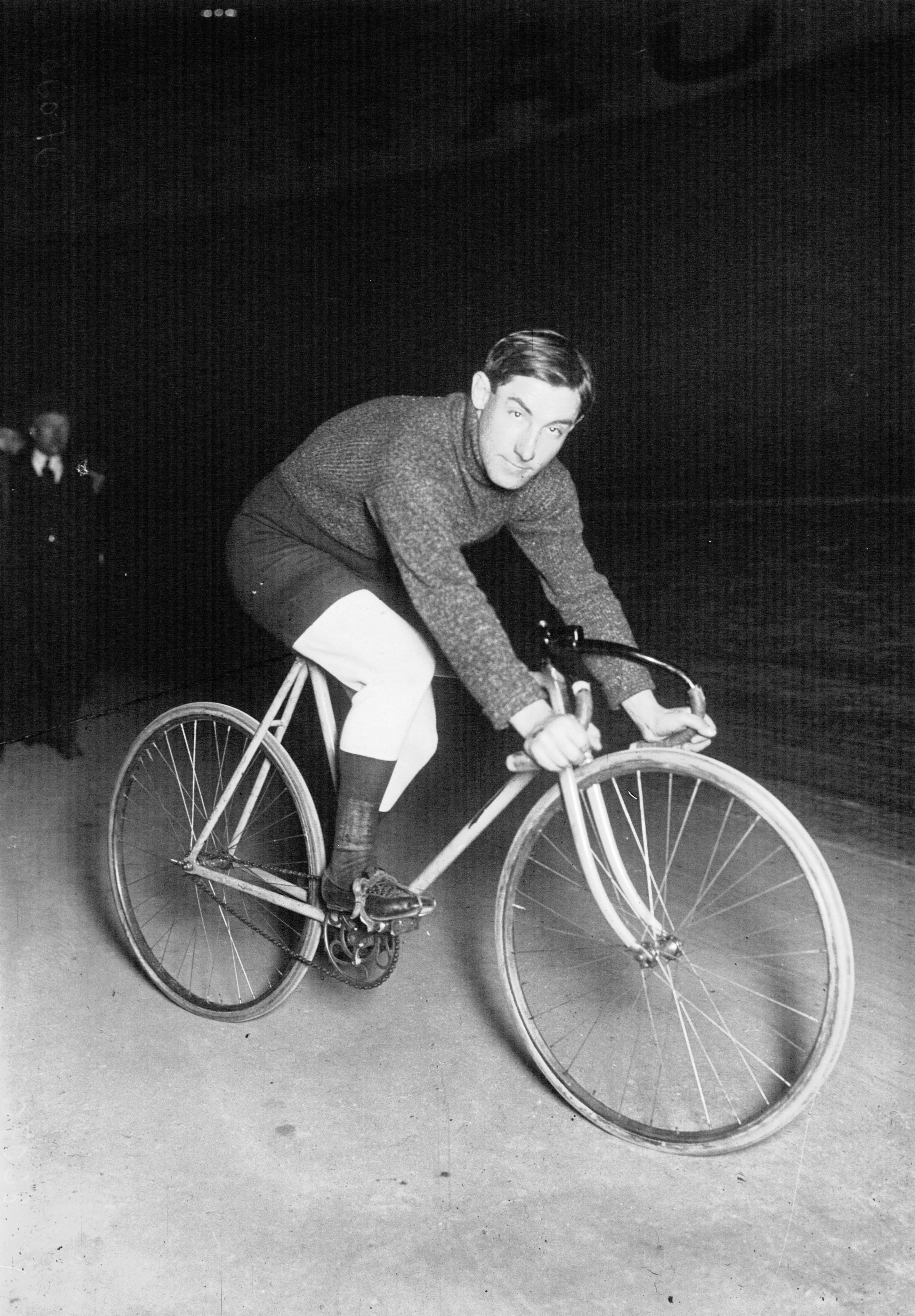 Girardengo, coureur cycliste.